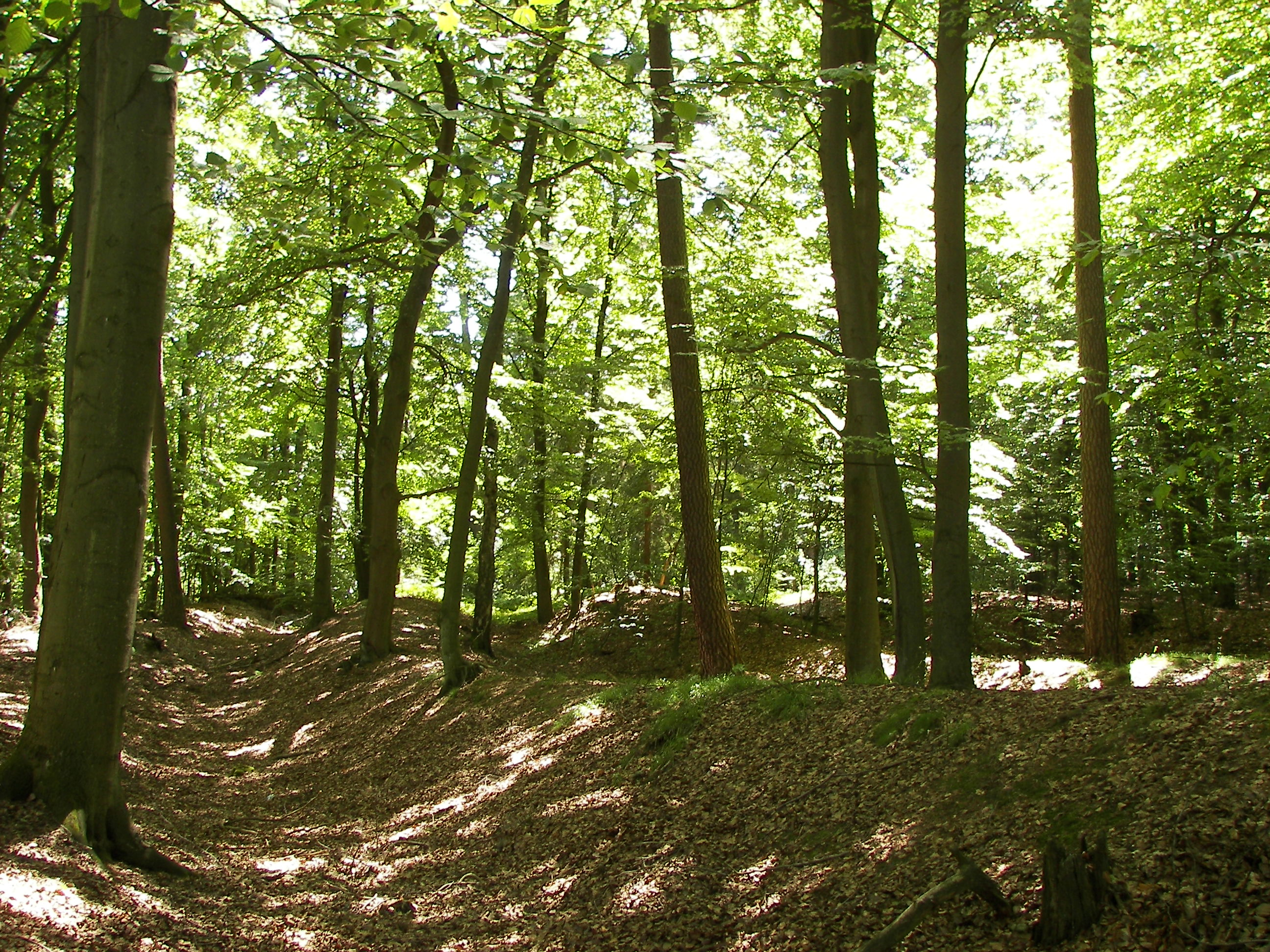 Burgwald, Erdwälle um den Christenberg